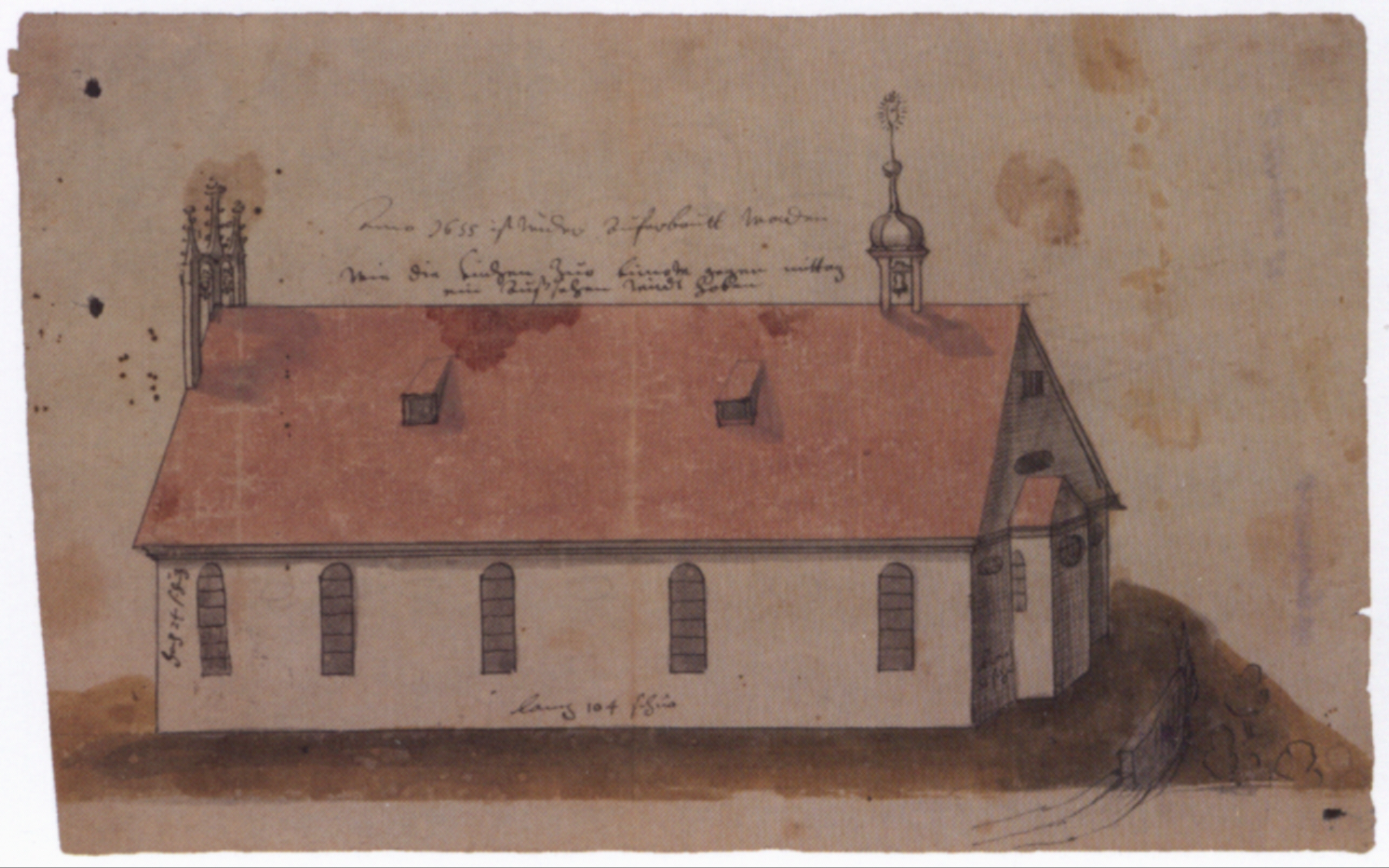 Entwurf zum Neubau der Wallfahrtskirche von Altbirnau; schwarze Feder über schwarzem Stift; koloriert auf gelblich grauem Papier; wahrscheinlich vor 1614.